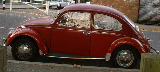 VW Beetle taken by C Ford 2003 Slika:Vw beetle.jpg